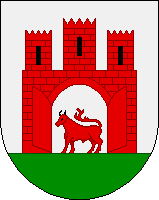 Герб Язловця 1723 року